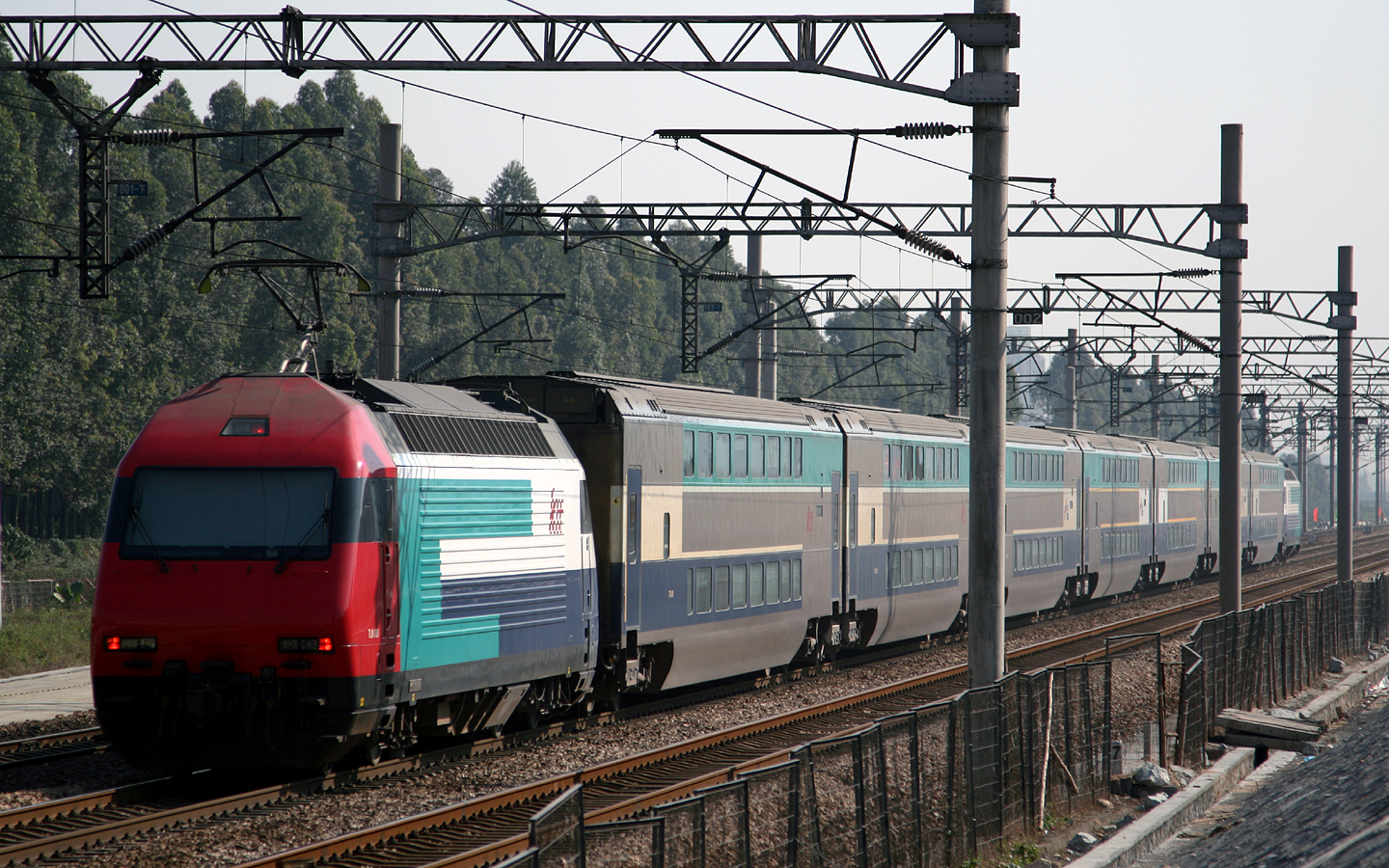 ktt 九廣通列车通过广深铁路石牌站